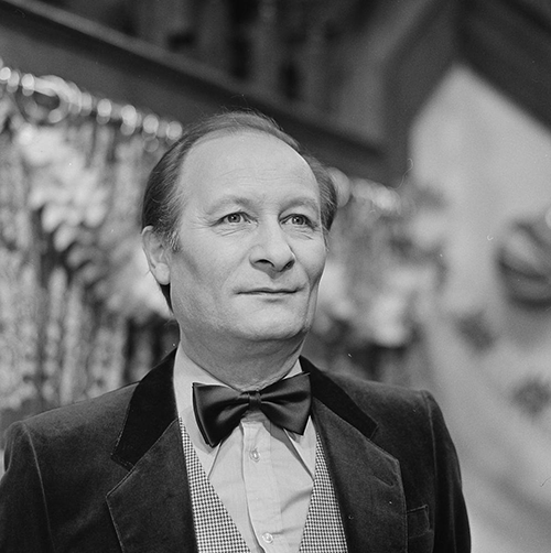 Cor van Rijn als Jan Thomtidom in de Nederlandse televisieserie De Zevensprong in 1981